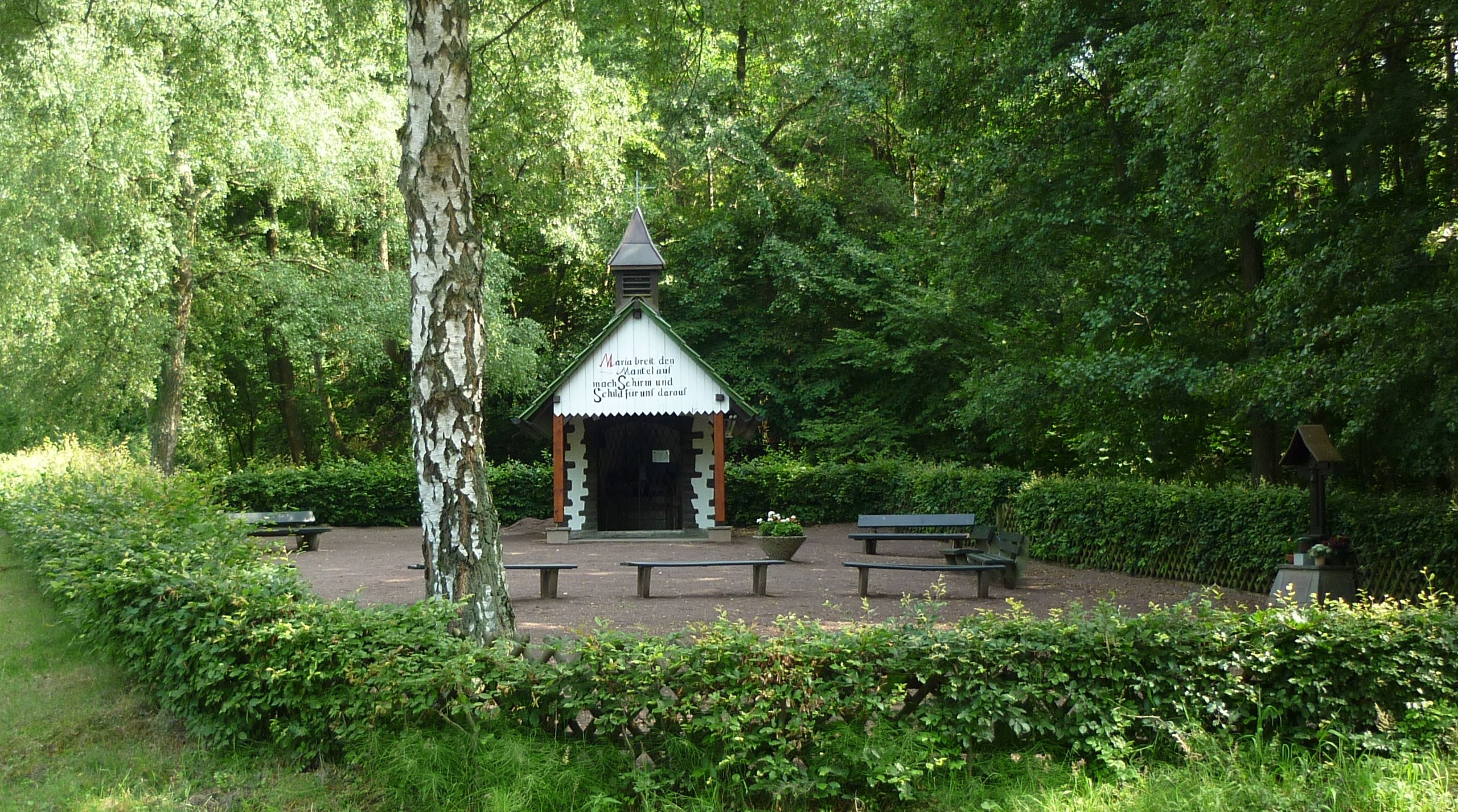 Kapelle am Dachsberg, zwischen Stockhausen und Rottbitze, Aegidienberg